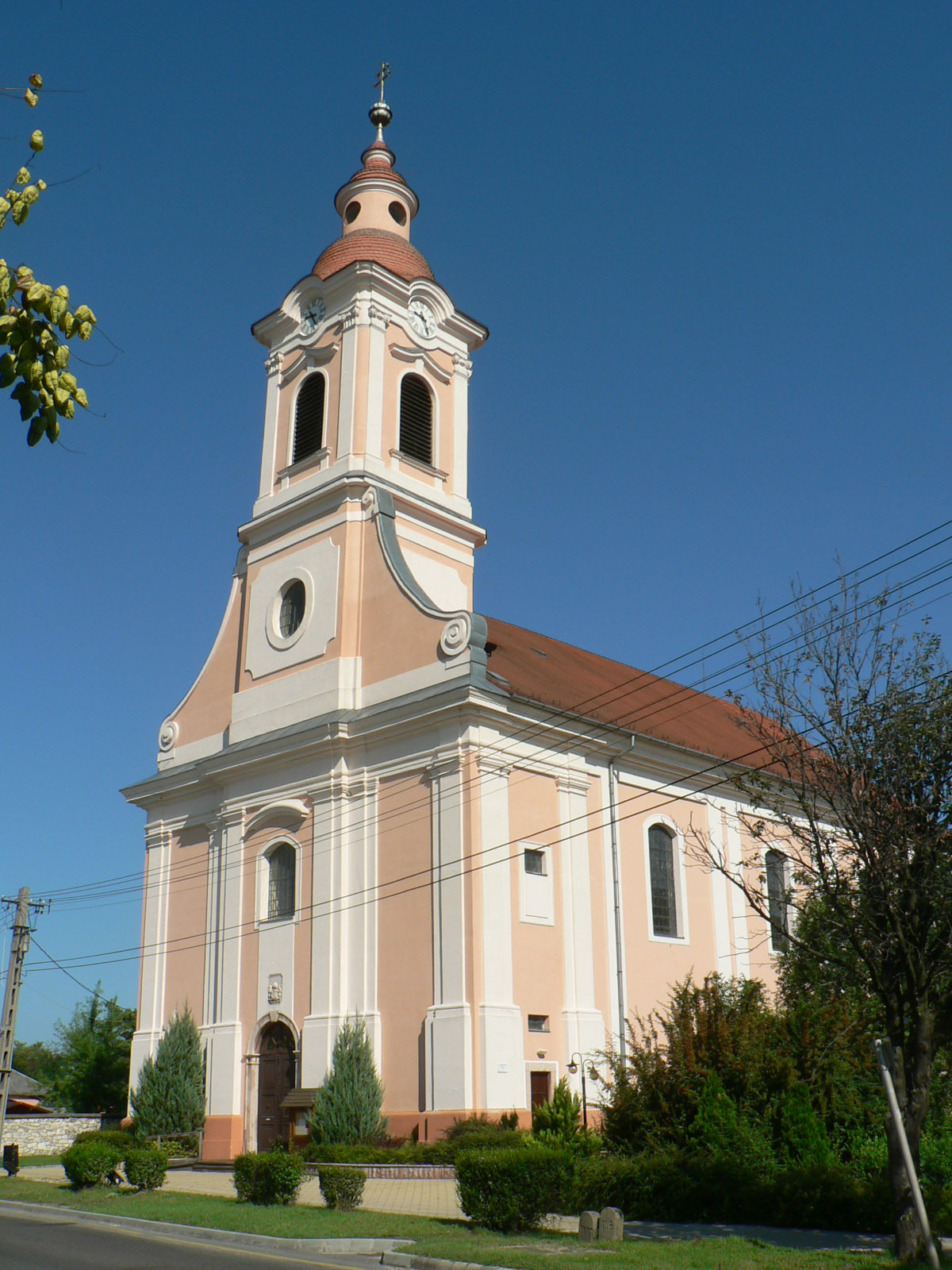 Nyergesújfalu római katolikus temploma 2010 augusztusában